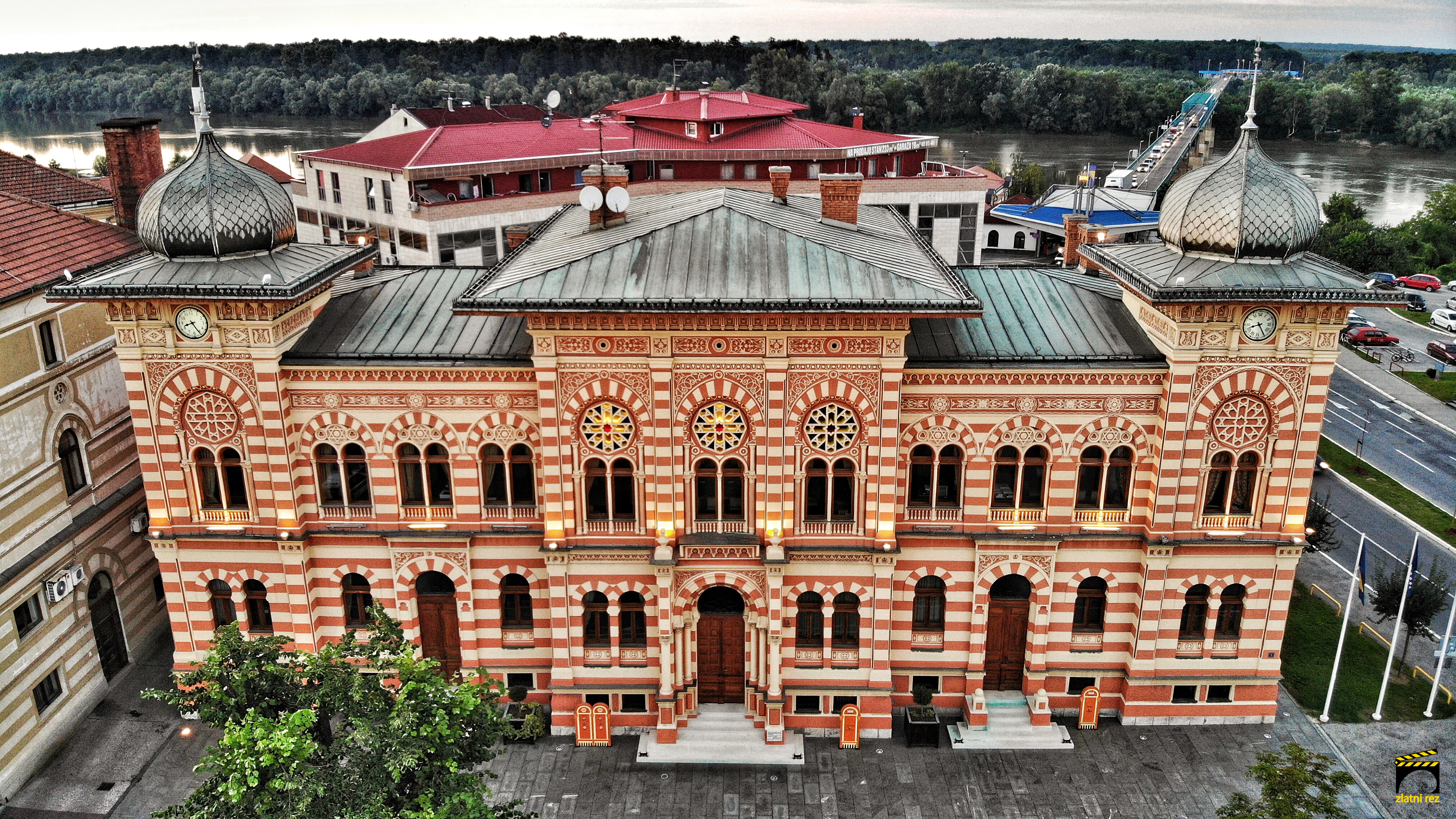 Брчанска Вијећница, фотографисана из ваздуха. У позадини се види ријека Сава и Савски мост.